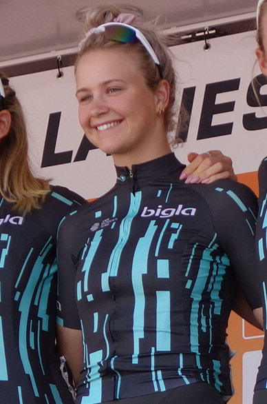 Emma Cecilie Norsgaard Jørgensen (Bigla) bij de start van de eerste etappe van Stramproy naar Weert in de Boels Ladies Tour 2019